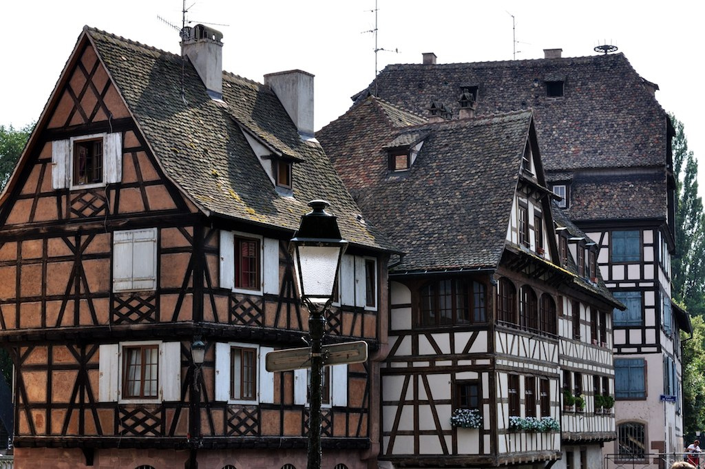 Strasbourg, Maison de l'éclusier (XVIIIe-1950), 2 quai des moulins